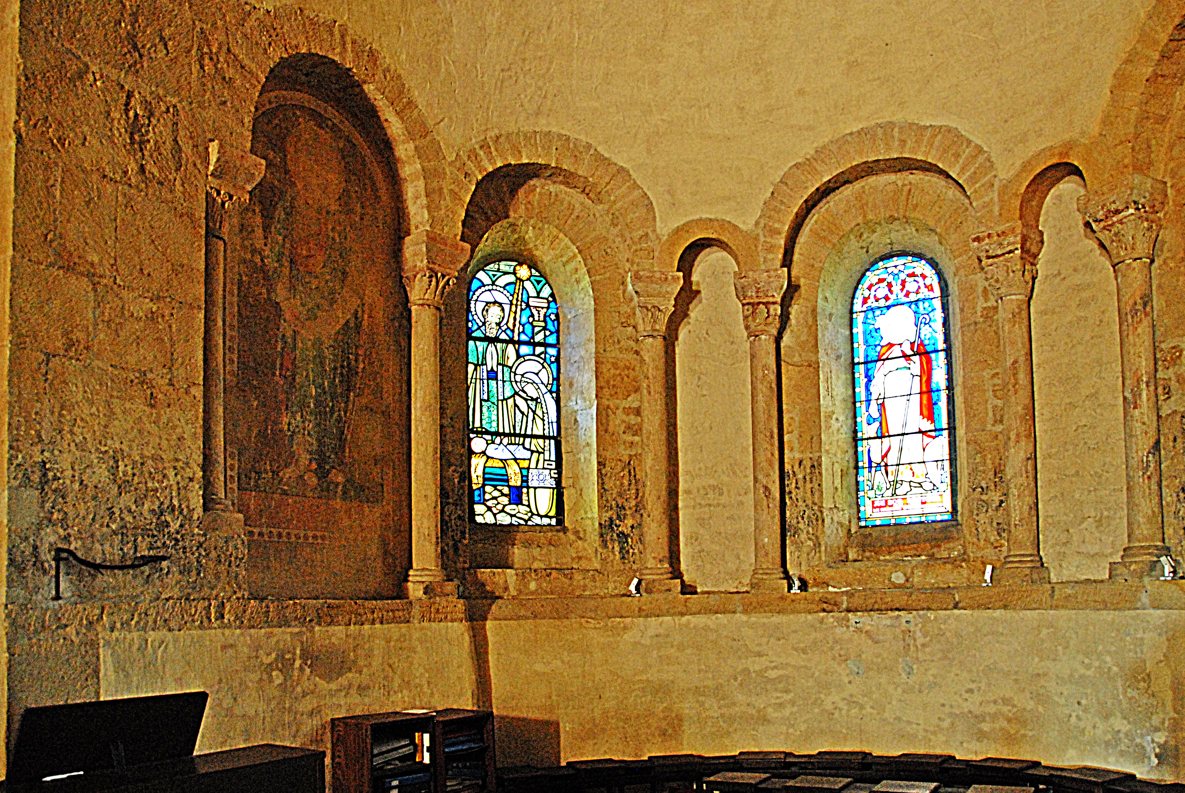 St-André d'Iguerande, linke Seite der Chorapsis